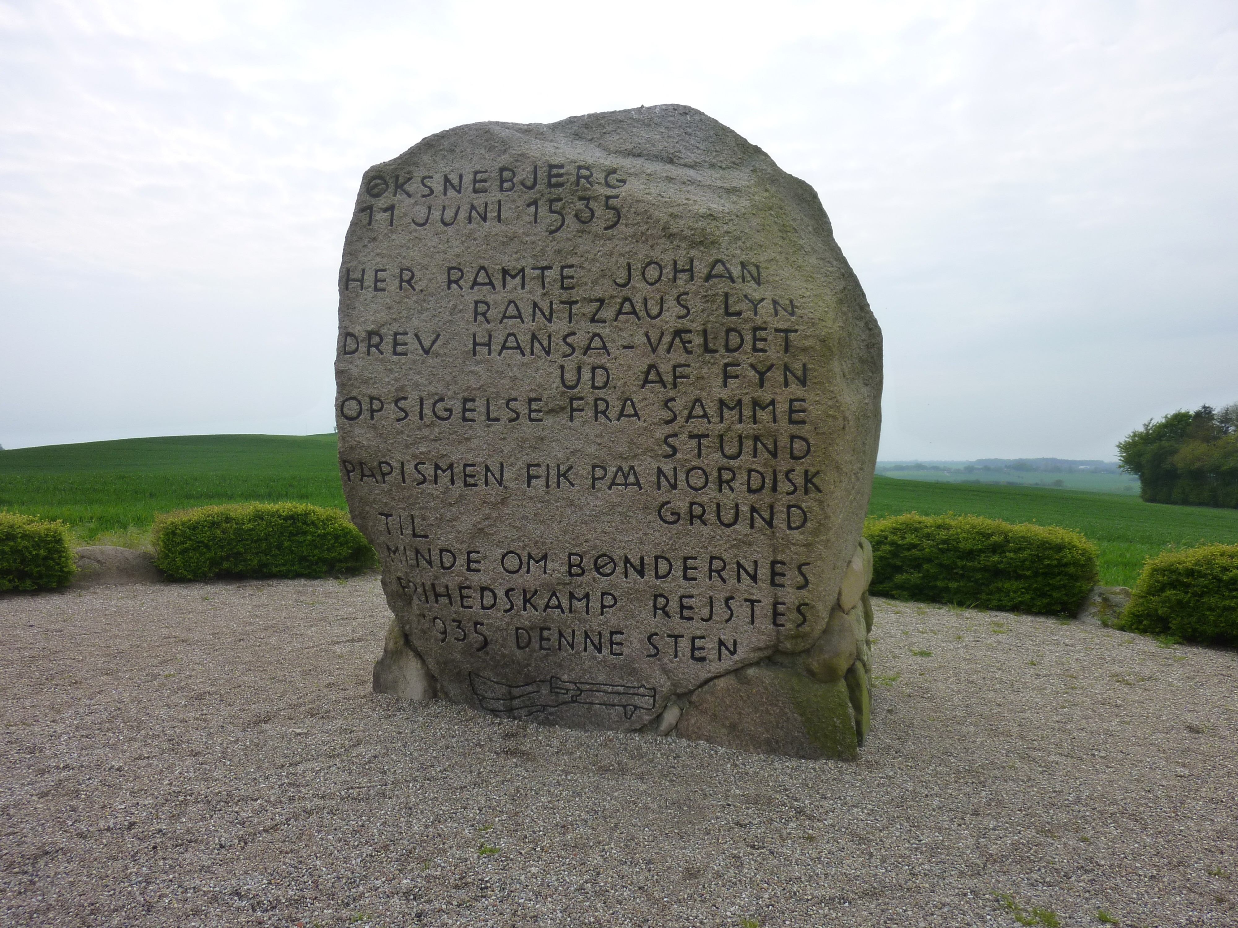 ØKSNEBJERG 11 JUNI 1535 HER RAMTE JOHAN RANTZAUS LYN DREV HANSA-VÆLDET UD AF FYN OPSIGELSE FRA SAMME STUND PAPISMEN FIK PAA NORDISK GRUND TIL MINDE OM BØNDERNES FRIHEDSKAMP REJSTES 1935 DENNE STEN